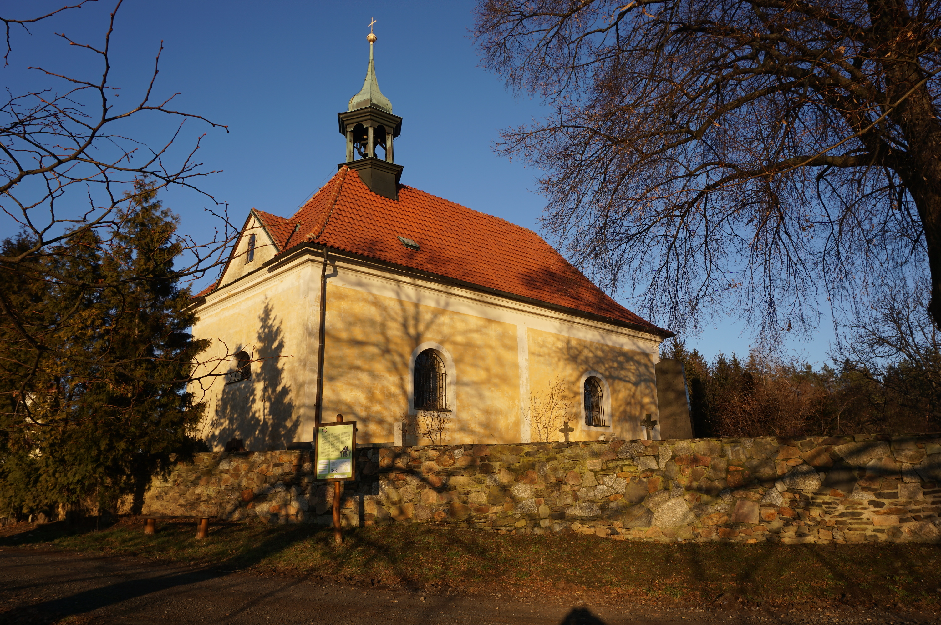 Kostel svatého Bartoloměje, Březí, Březí (okres Praha-východ).